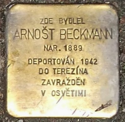 Stolpersteine, Komenského 927/19 Olomouc, Beckmann Arnošt